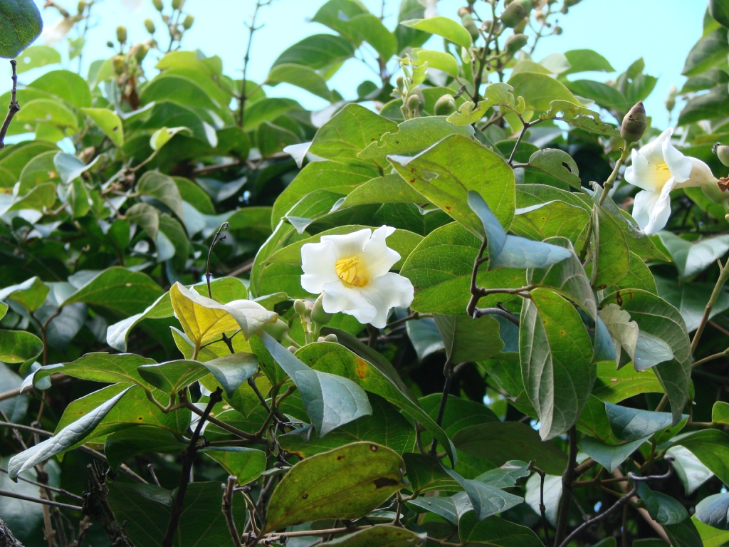 Distictella elongata - BIGNONIACEAE Jardim Botânico de Brasília - Distrito Federal - Brasil.